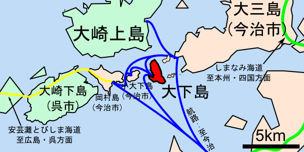 大下島の位置図